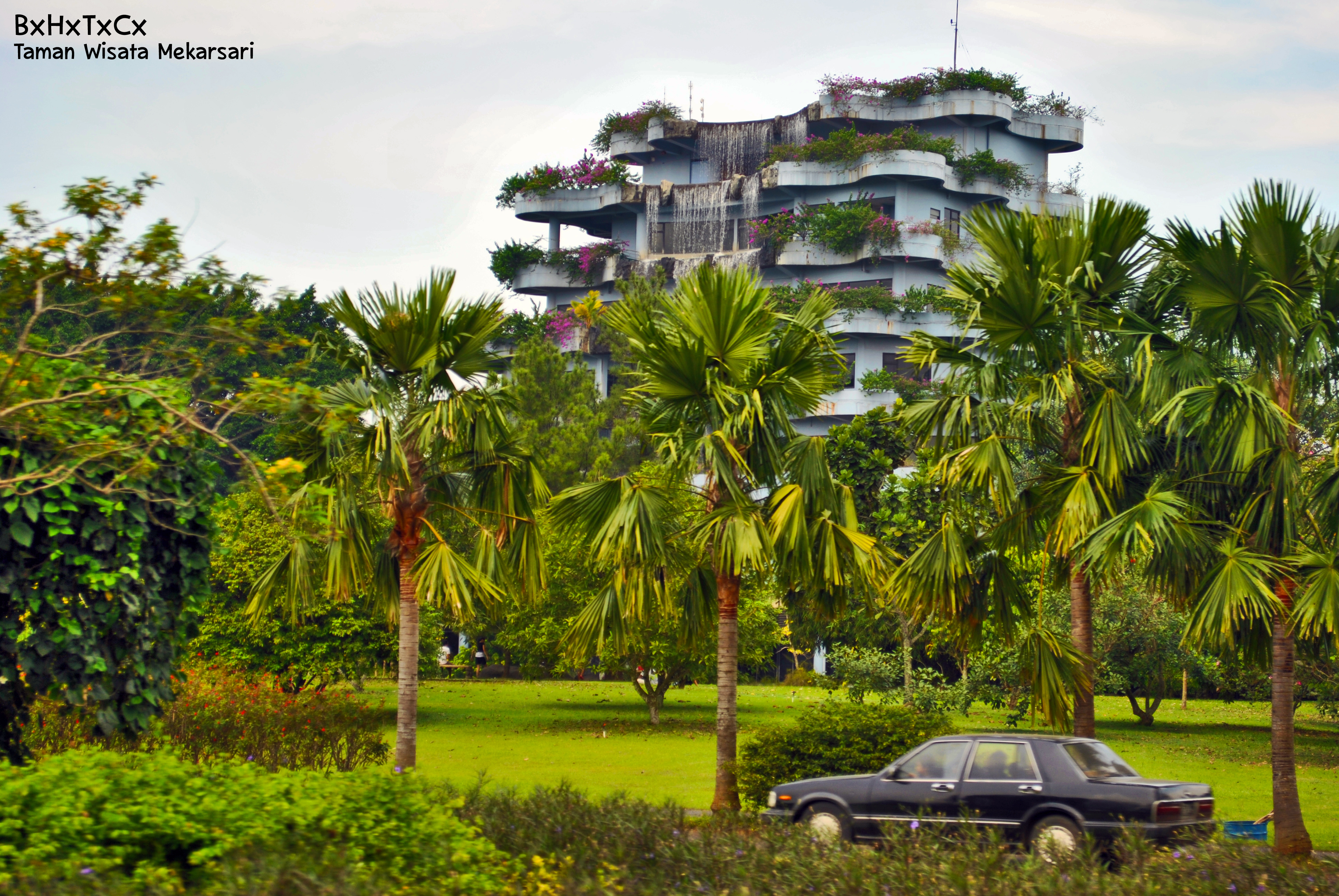 Mekarsari Waterfall Building